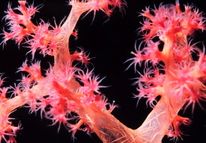 ססגונית